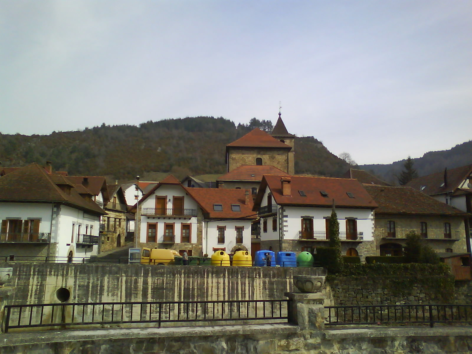 Ezkarozeko herria.